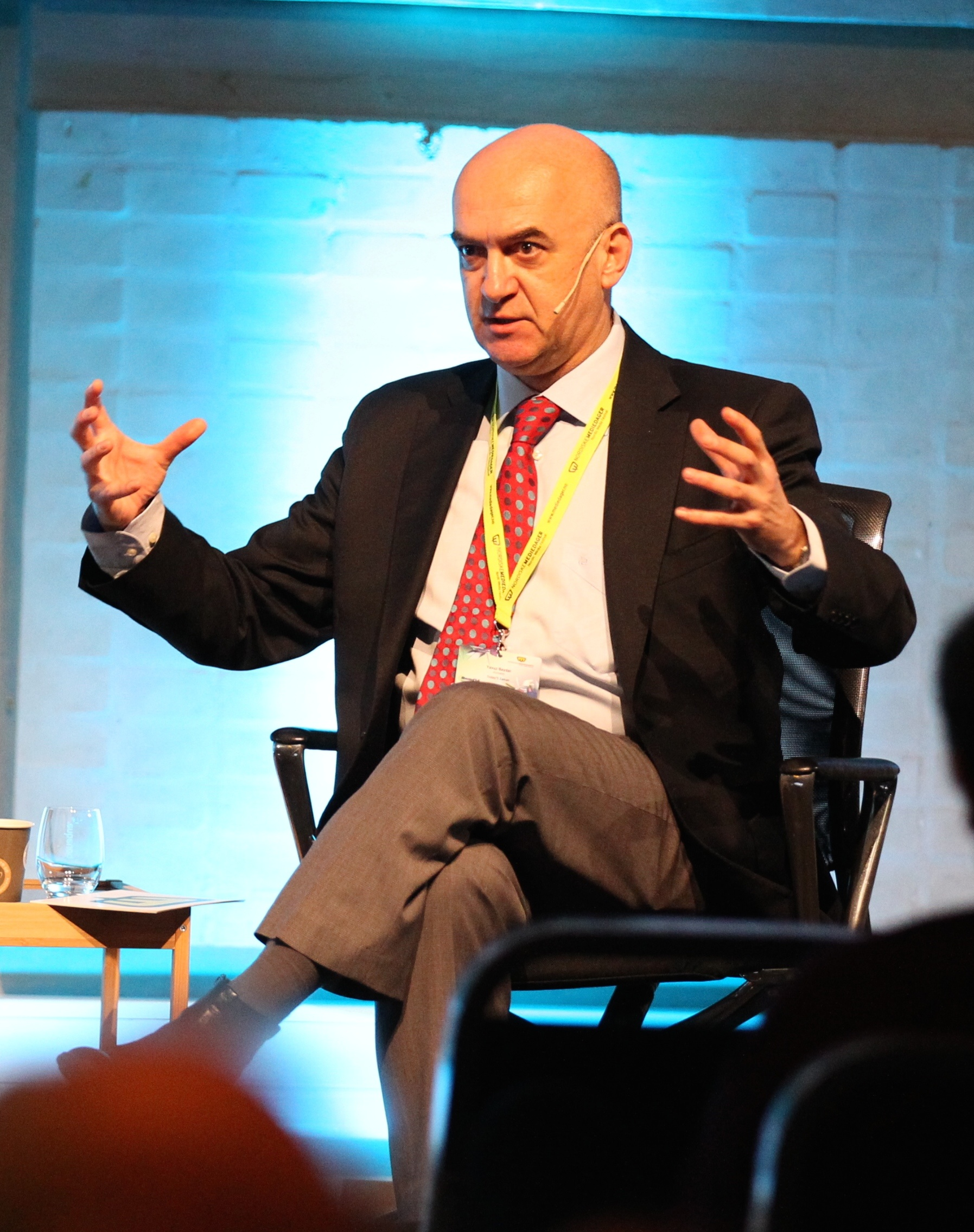 Medvirkende: Yavuz Baydar (Today´s Zaman) Moderator: Kristin Solberg (Aftenposten)